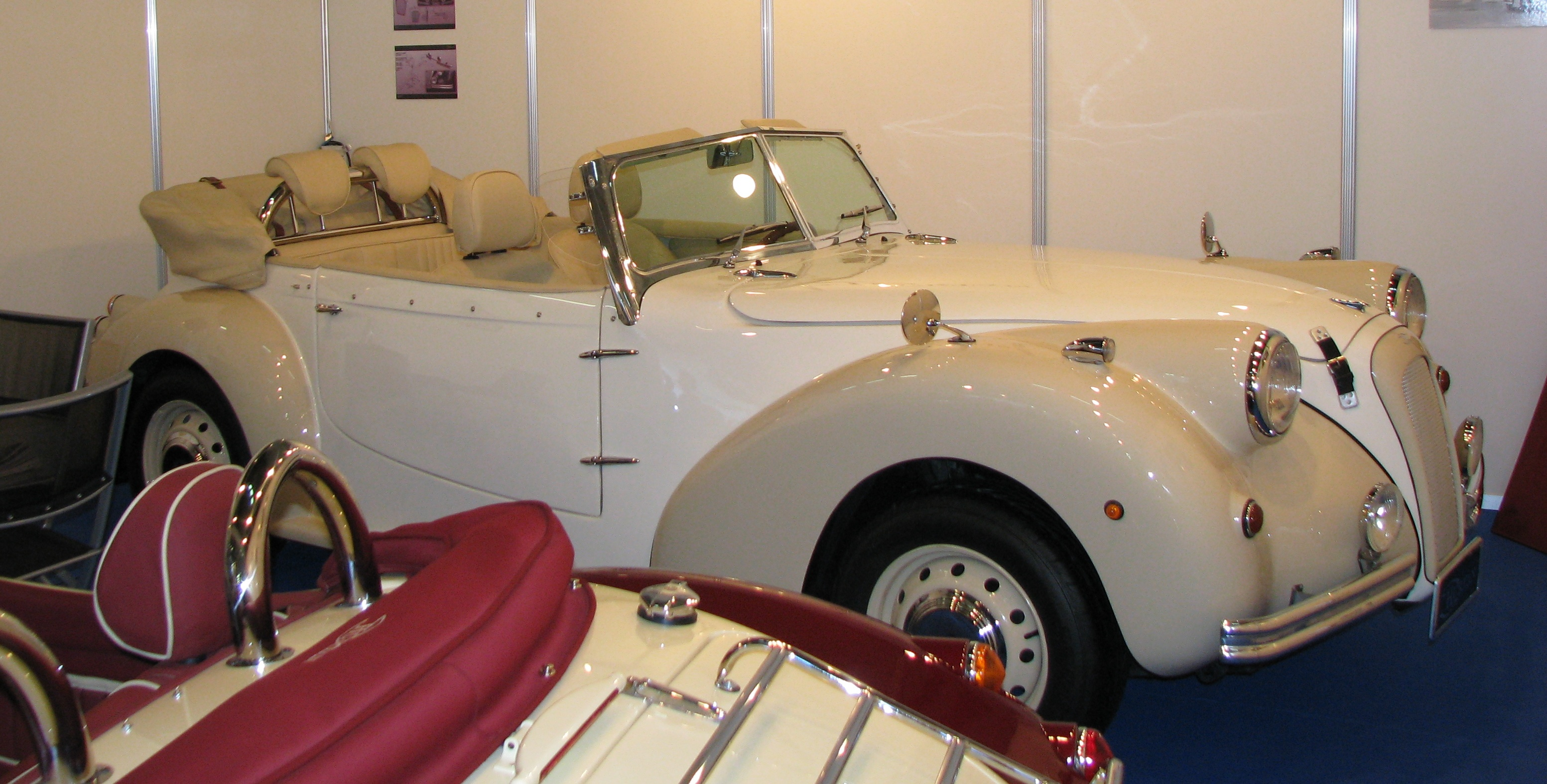 Hurtan Albaycín T2+2 en el Salón Internacional del Automóvil de Barcelona 2009.